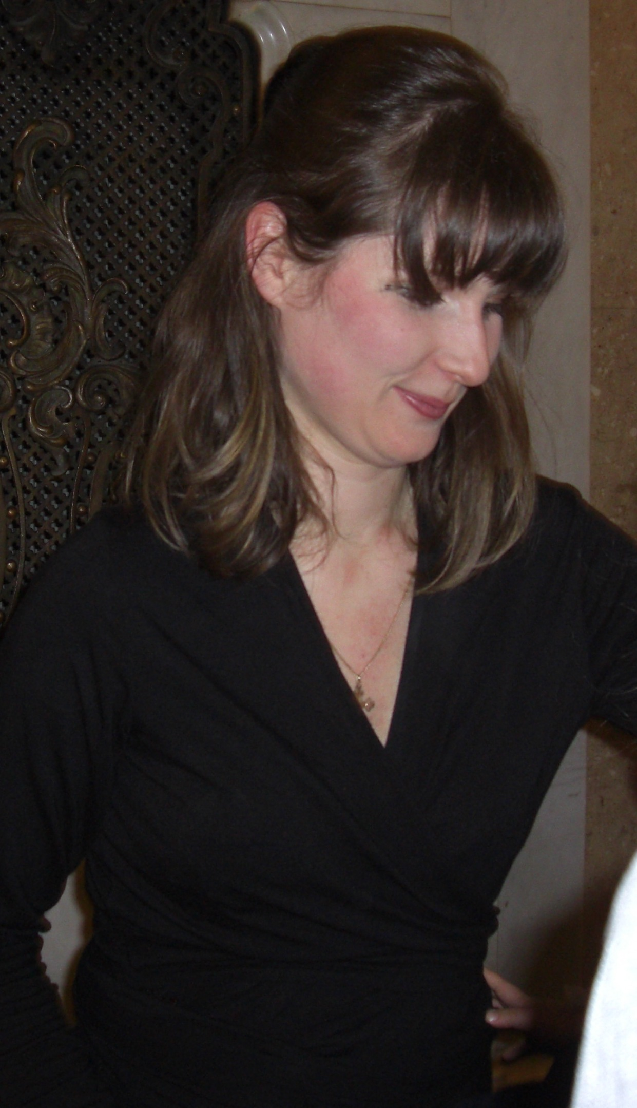 Lisa Batiashvili nach einem Konzert in der Musikhalle Hamburg (Laeiszhalle) beim Autogramme geben. Sie spielte an dem Abend von Jean Sibelius das Violinenkonzert d-moll op. 47.